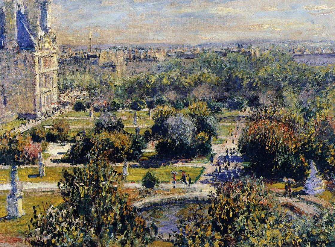 Les tuileries (étude), Claude Monet, huile sur toile, musée Marmottan-Monet, Paris, France.